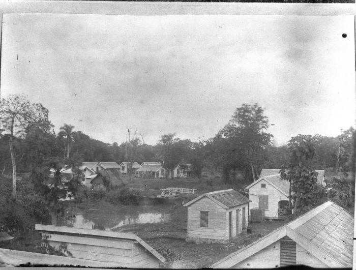 Foto. Overzicht op het terrein met gebouwen van de leprozerie 'Bethesda' aan de Suriname-rivier in Suriname.